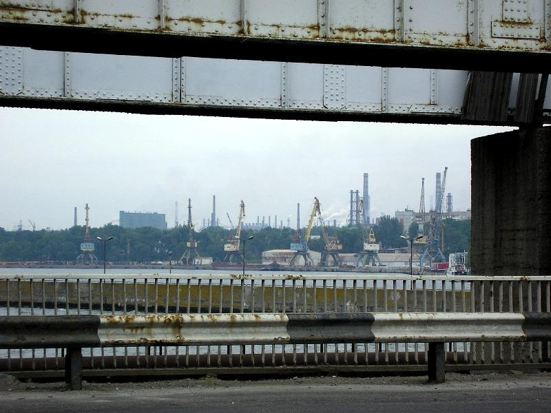 Záporoží. Pohled z hráze Dněprogesu na Zaporižstal. 2006.